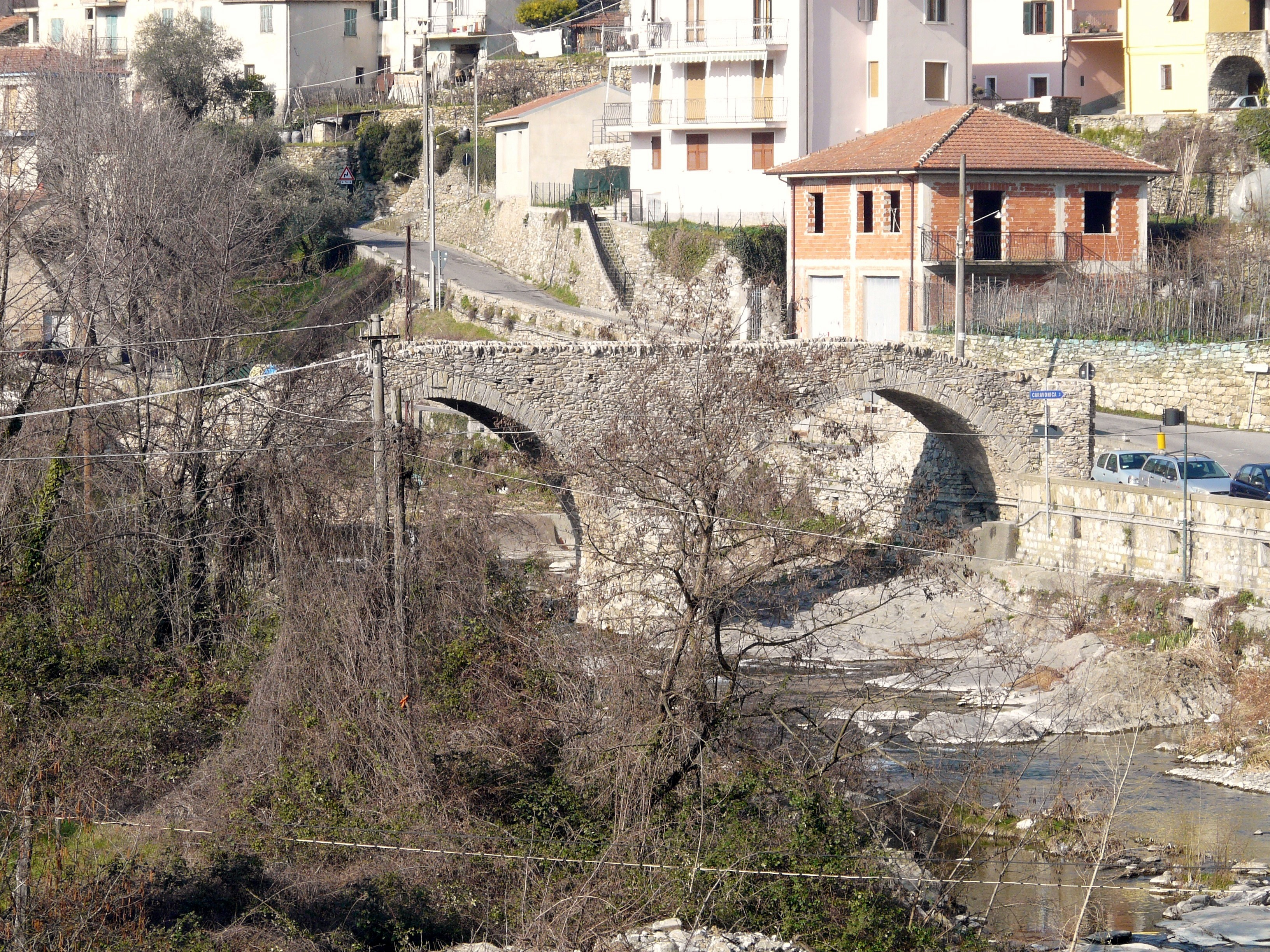 San Lazzaro Reale, Borgomaro, Liguria, Italia